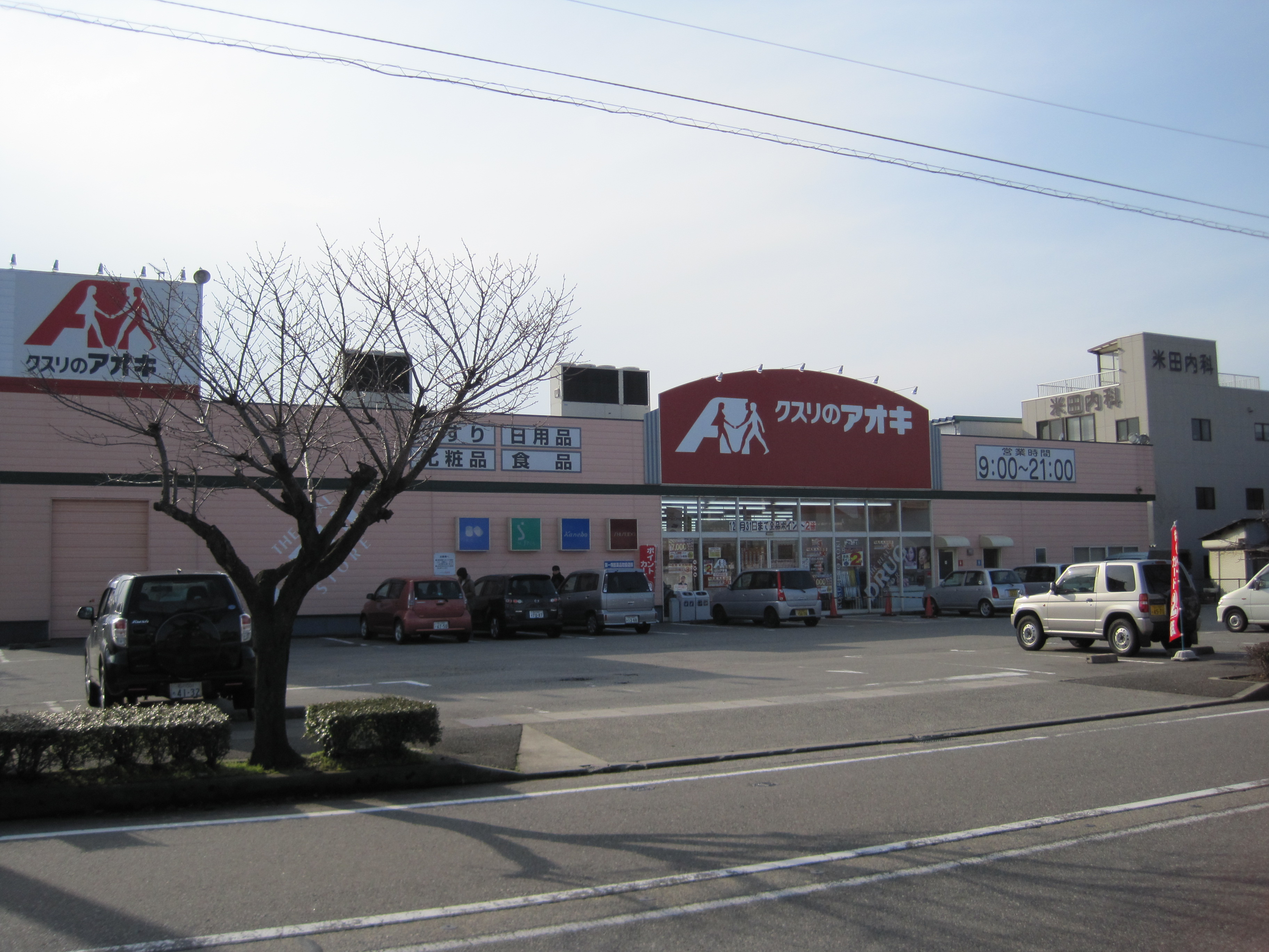 クスリのアオキ石同新町店（石川県白山市）、現在のロゴマークを使用。